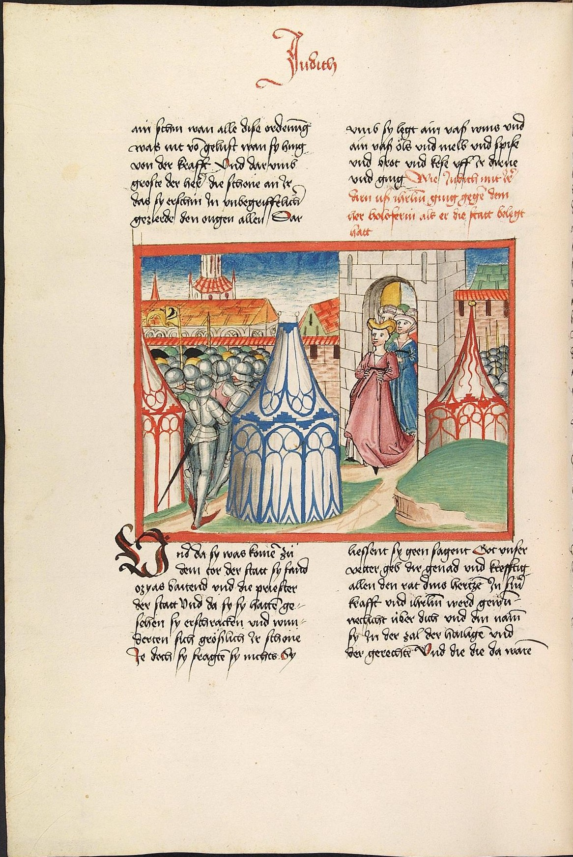 Codex Palatinus germanicus 17, Blatt 252v - Bibel, Altes Testament, Buch Judit: Judith und ihre Dienerinnen verlassen Betulia, um ins Lager des Holofernes zu gehen. (Cpg 17 = Bibel AT, deutsch, Bücher Könige, Chroniken, Esra, Tobias, Judit, Ester, Hiob)